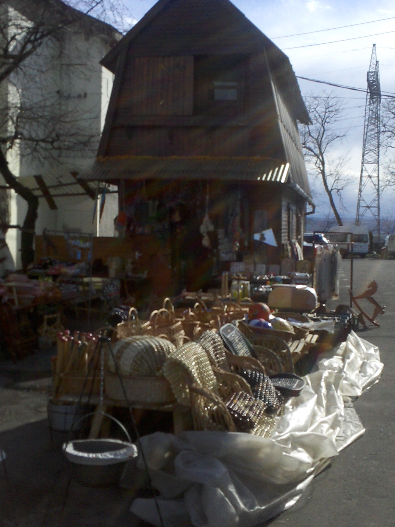 tienda en Hanul Ancuţei